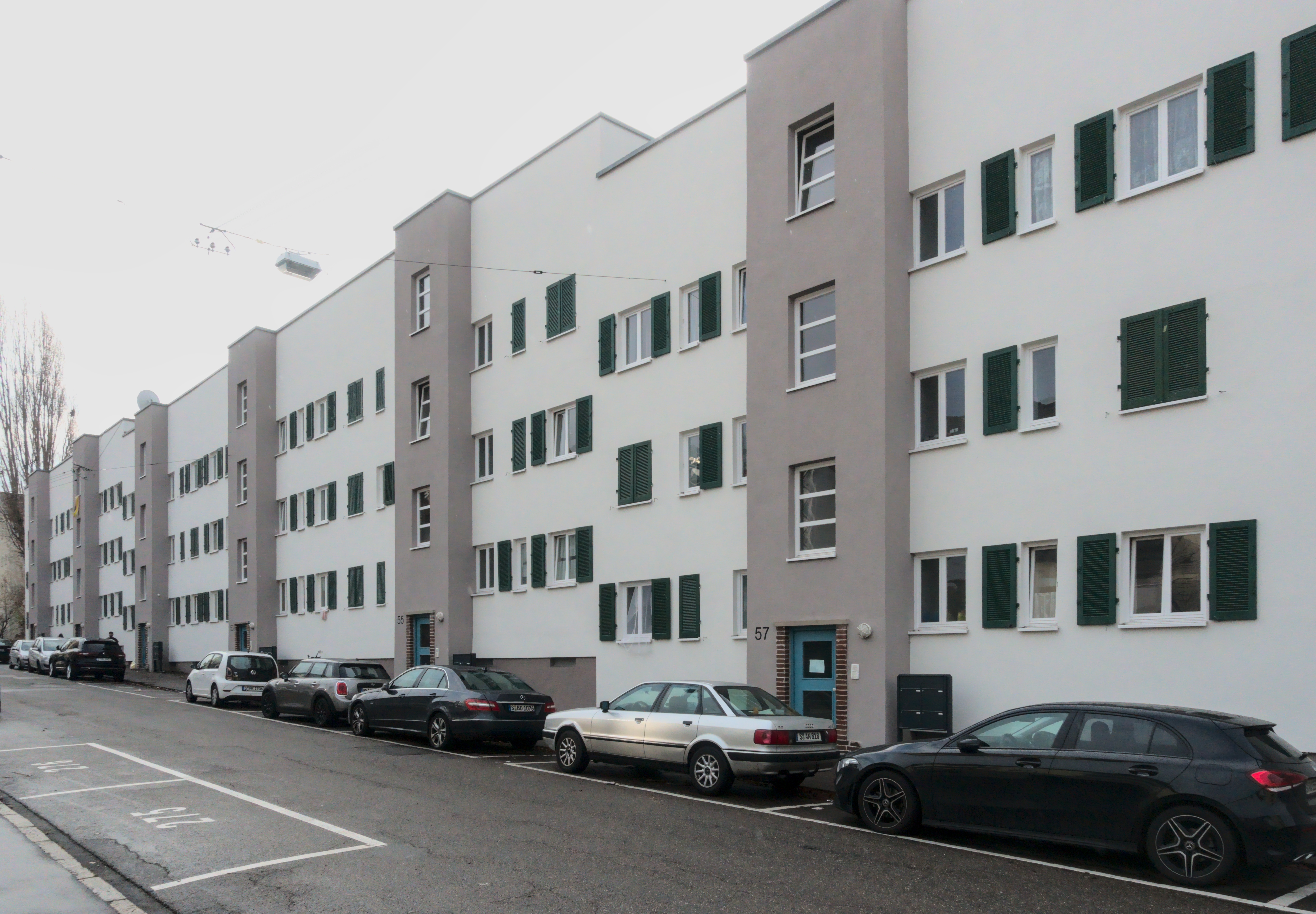 Wallmersiedlung in Stuttgart-Untertürkheim, jüngerer Teil, Sattelstraße